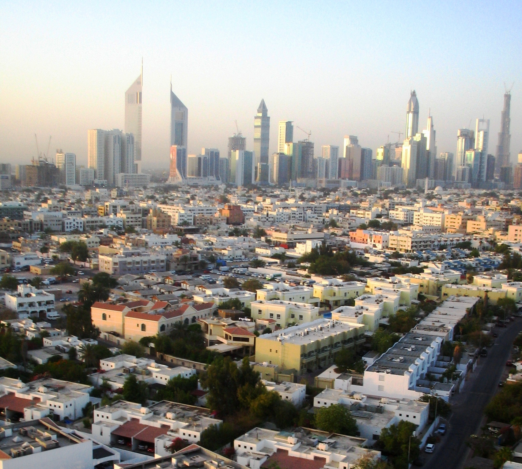 Dubai